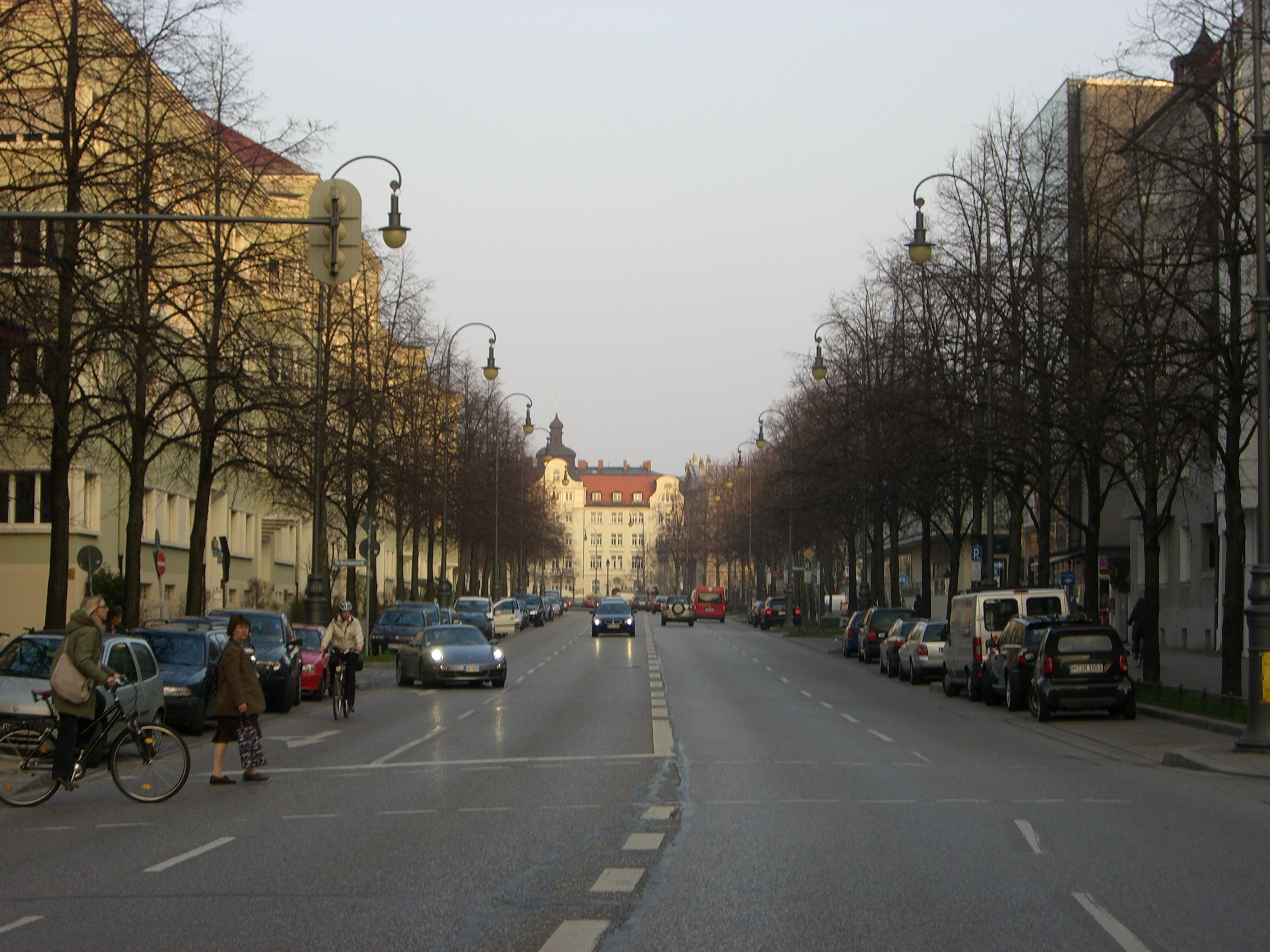 Prinzregentenstraße (Blick nach Osten)